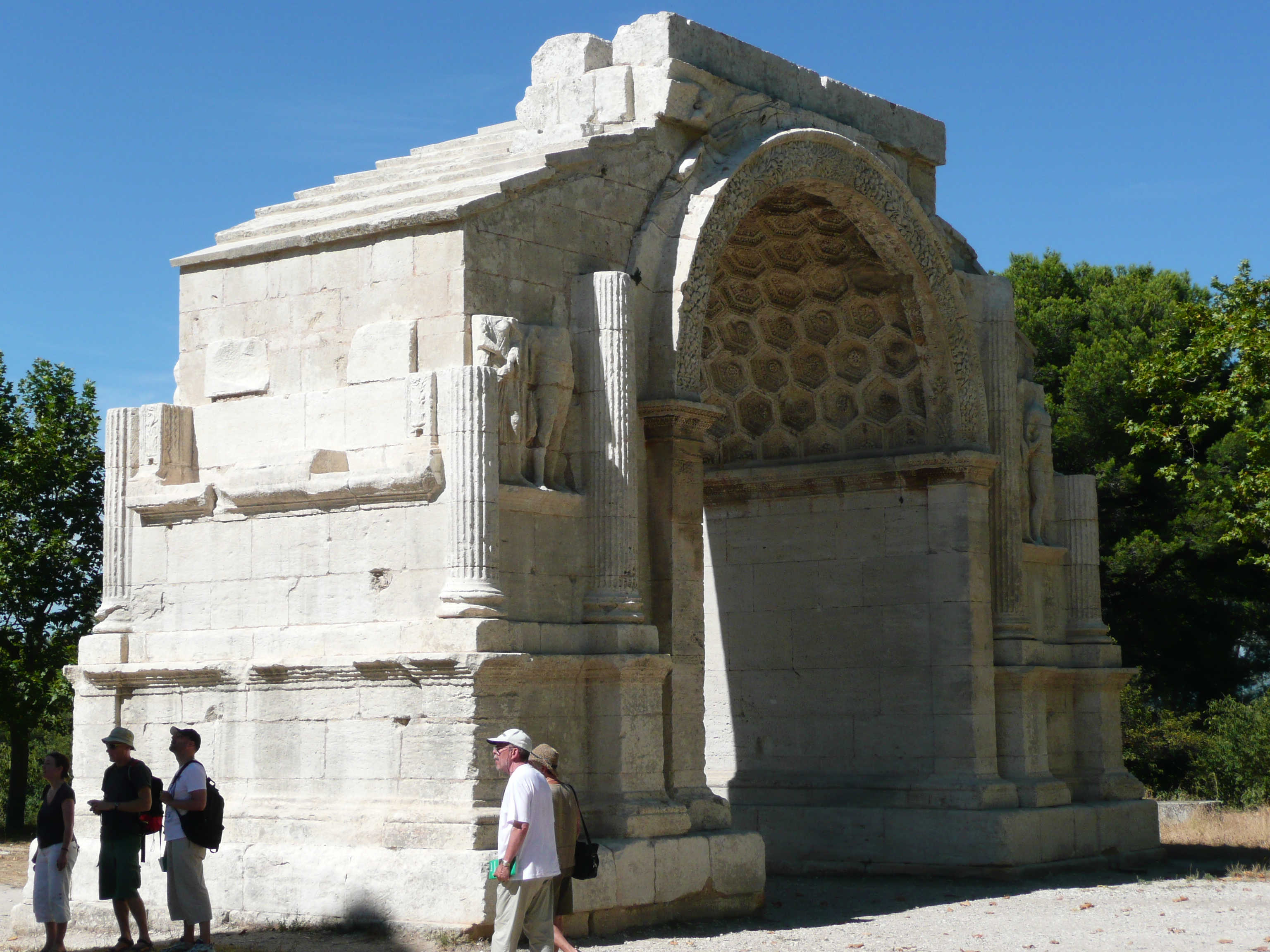 Arc de Saint-Rémy-de-Provence